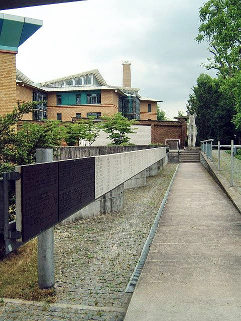 Gedenkstätte an die hier im Preungesheimer Gefängnis ermordeten Opfer des Nationalsozialismus aus vielen Ländern. Im Hintergrund eine Gedenkwand mit einem Spruch von Ricarda Huch. Vorne links die Tafeln mit den Namen.